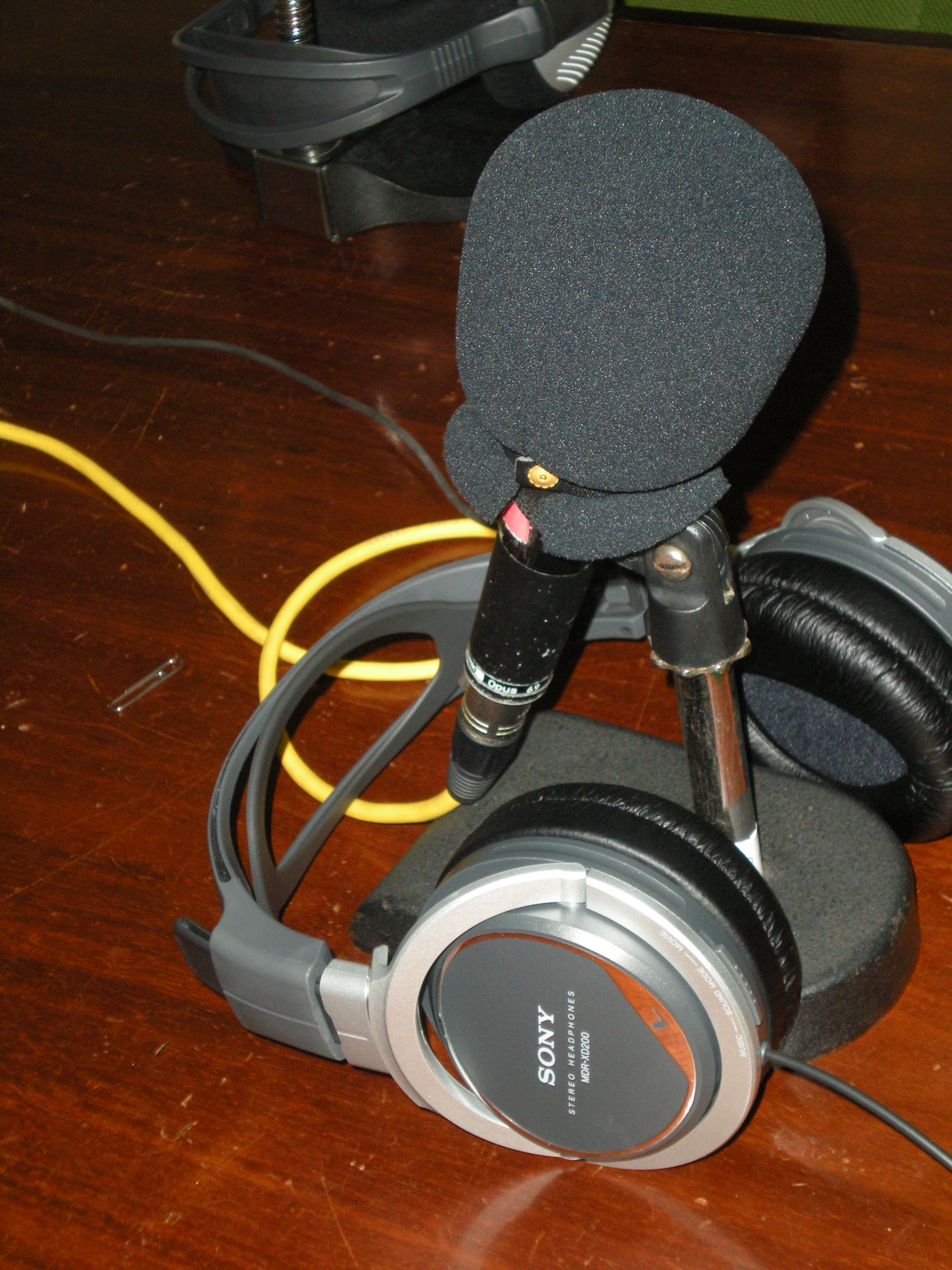 mikrofono bat